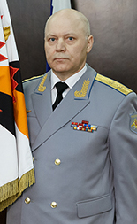 Начальник Главного управления Генерального штаба Вооруженных Сил Российской Федерации - заместитель начальника Генерального штаба Вооруженных Сил Российской Федерации генерал-лейтенант Игорь Валентинович Коробов